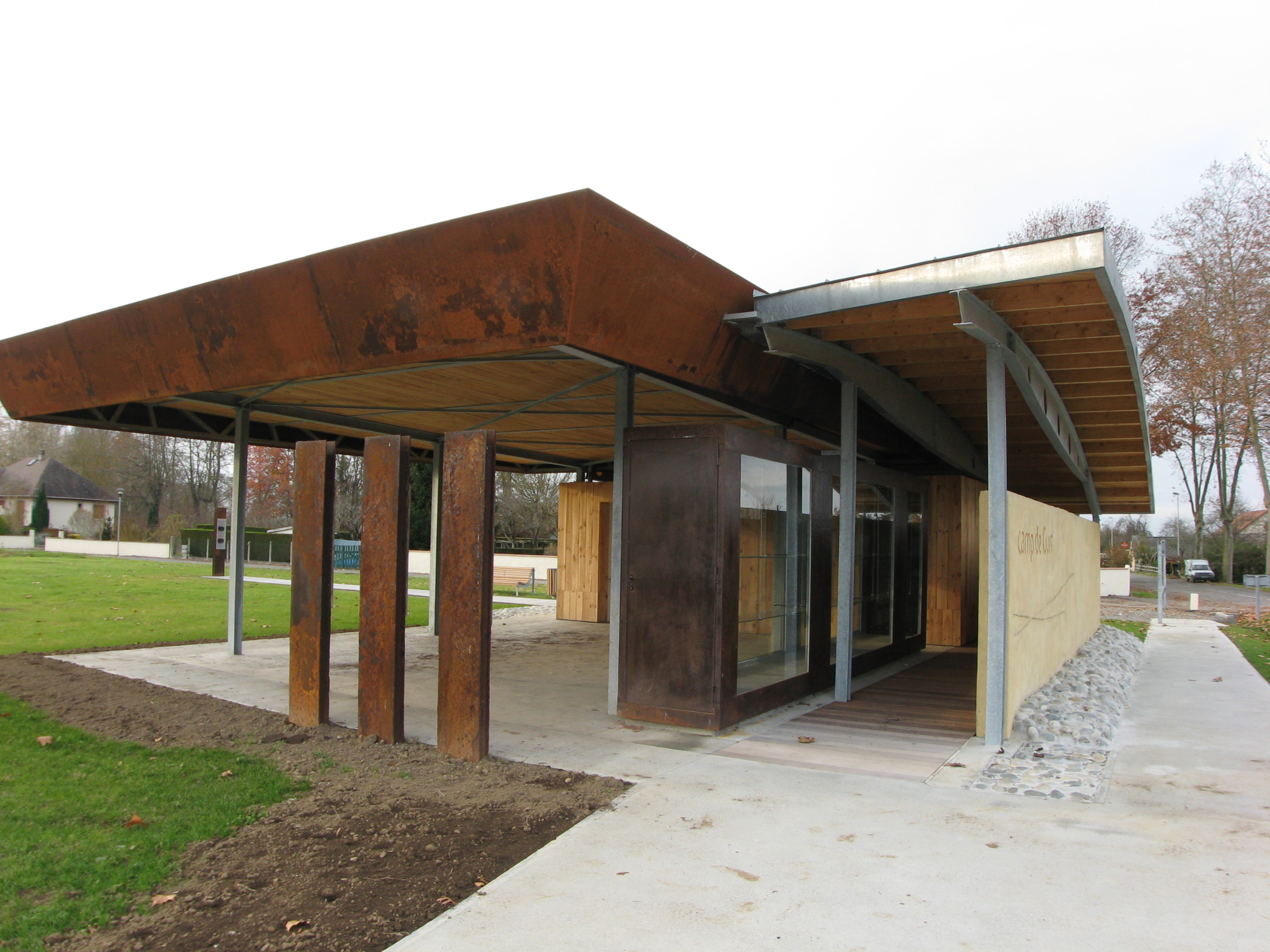 Vue intérieure du mémorial récent de Gurs (Pyrénées-Atlantiques) (Pyrénées).